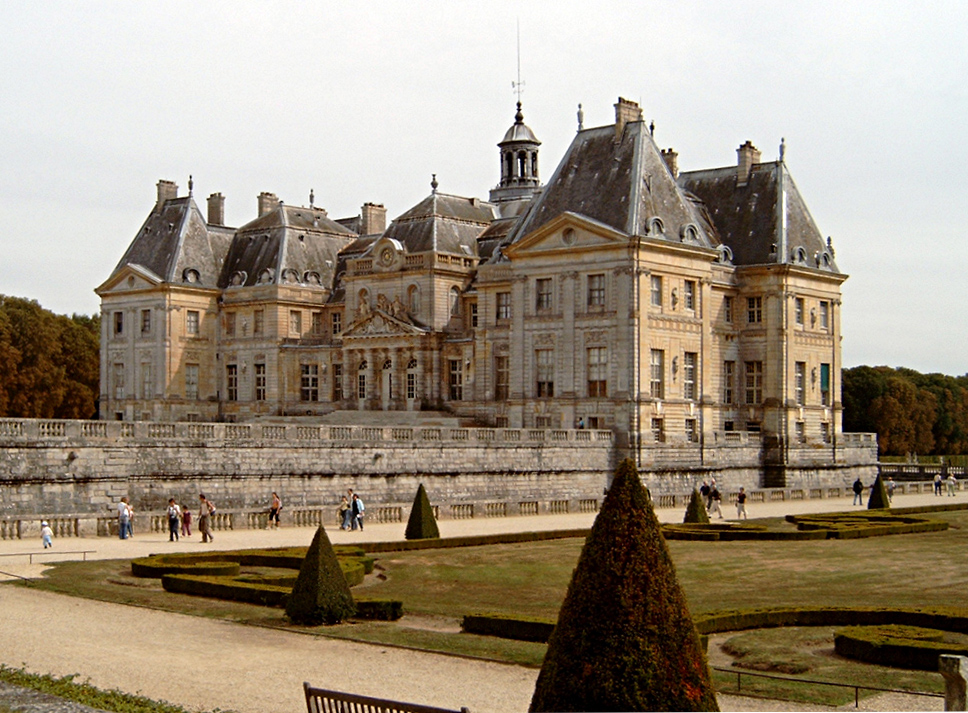 Front des Schlosses Vaux-le-Vicomte / Front of the chateau Vaux-le-Vicomte